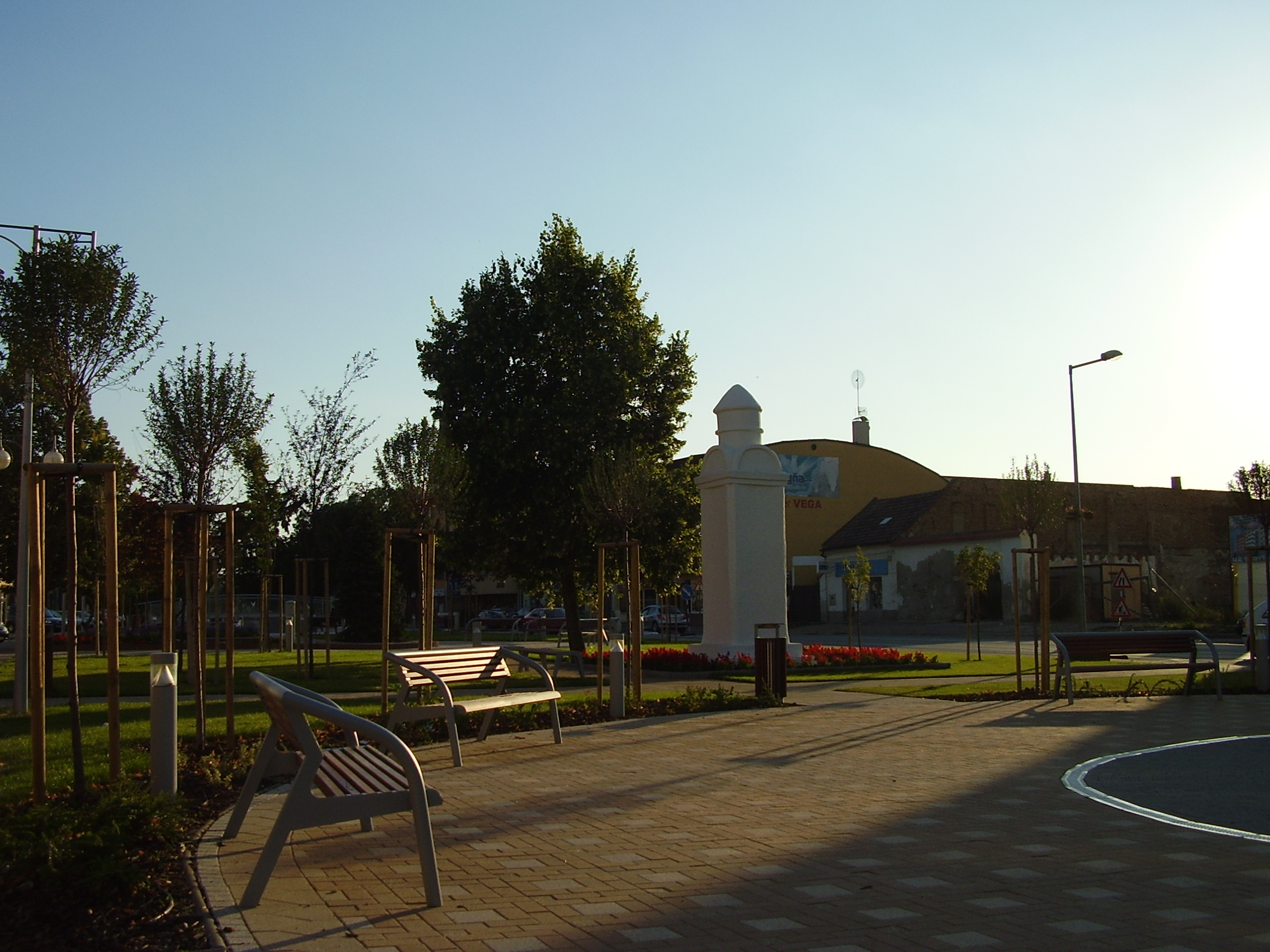 Senec